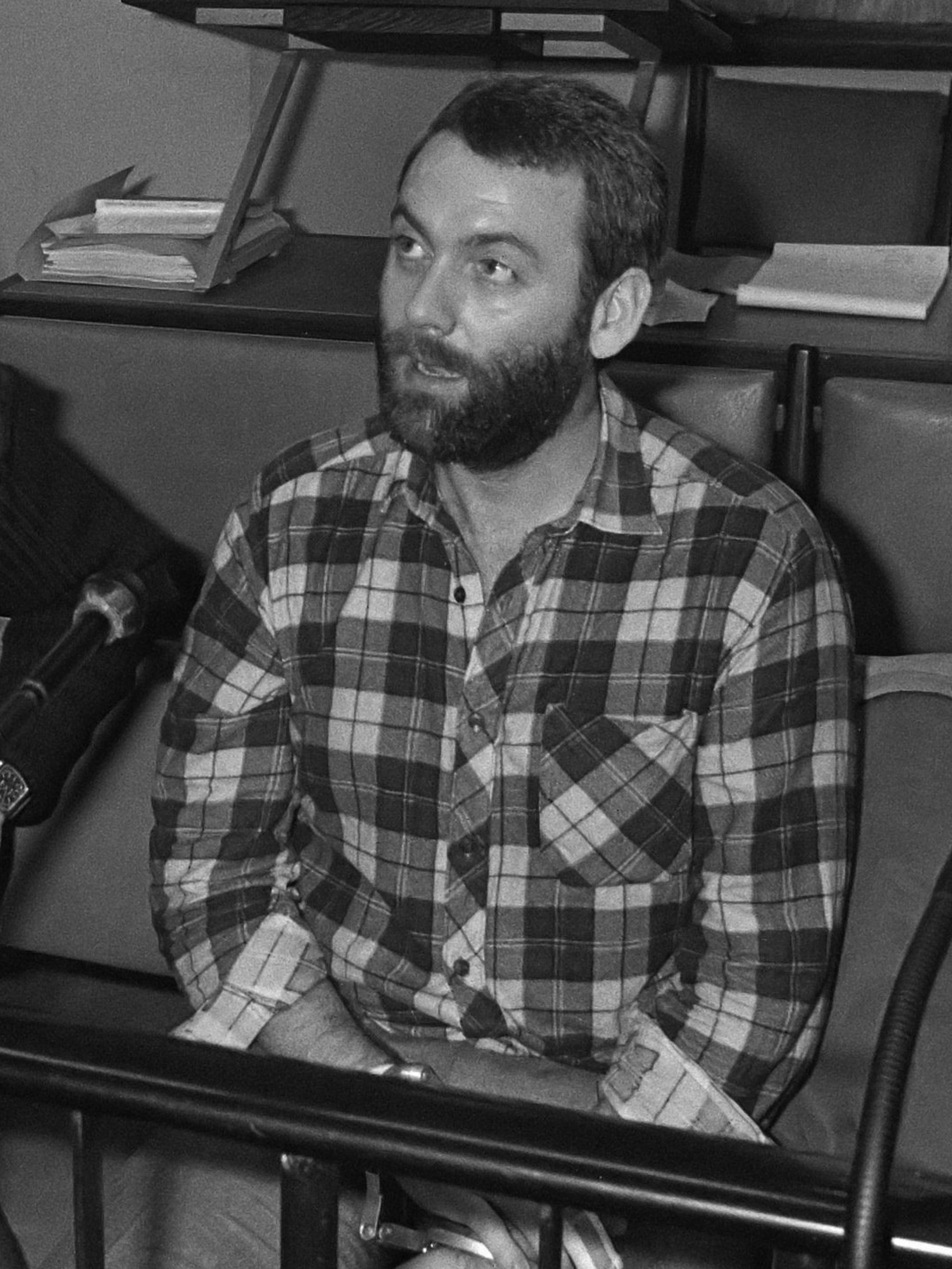 IRA-leden voor de rechter in Amsterdam; IRA-lid Mc Farlane 11 maart 1986